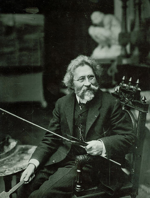 Репин